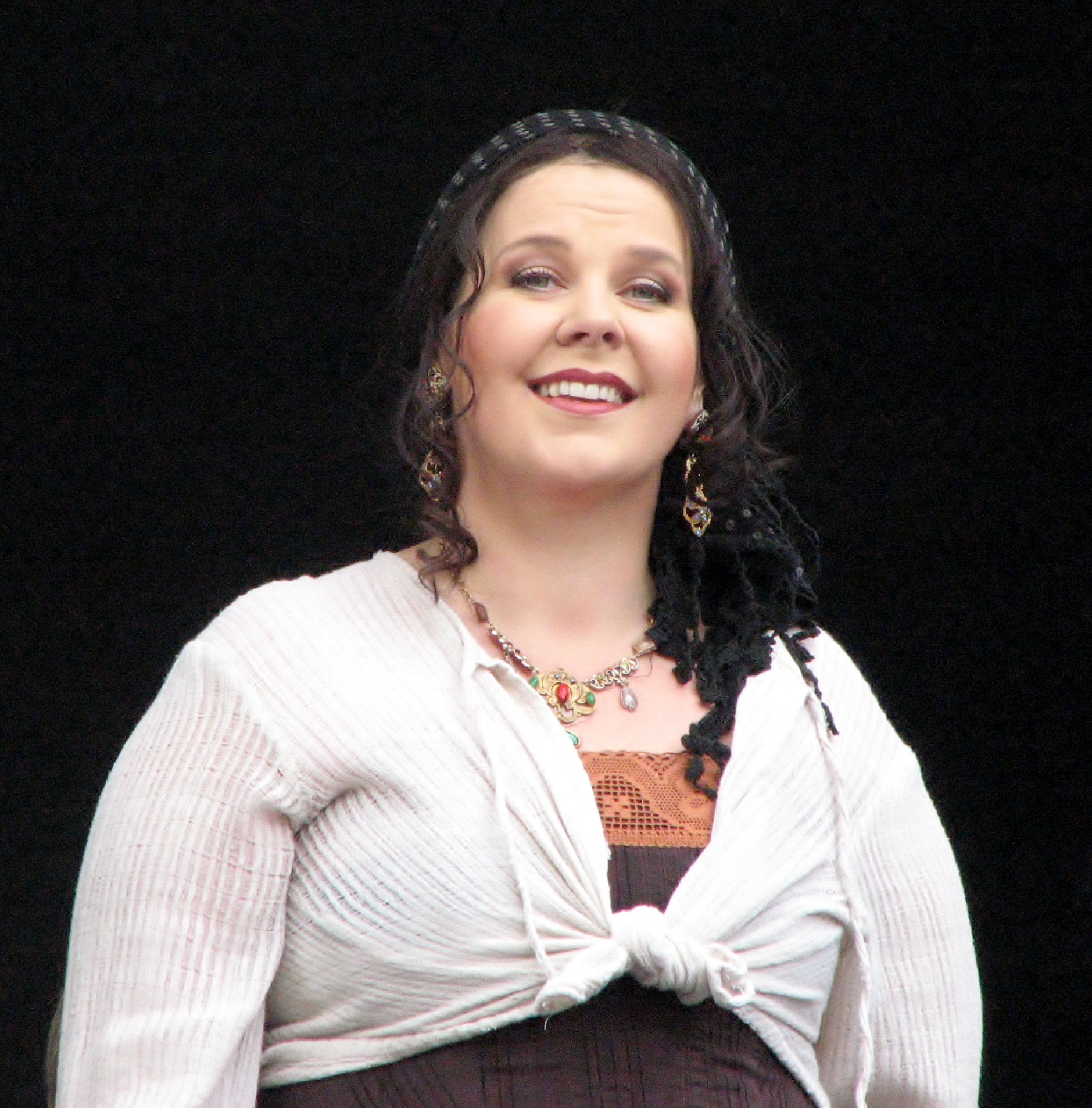 Juuli Lill esinemas Rahvusooper Estonia 107. hooaja avamisel